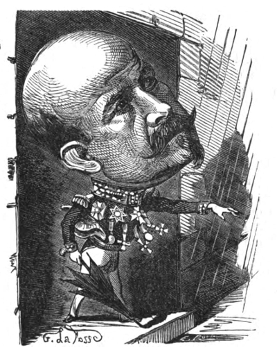 Portrait satirique de Louis Jules Trochu.